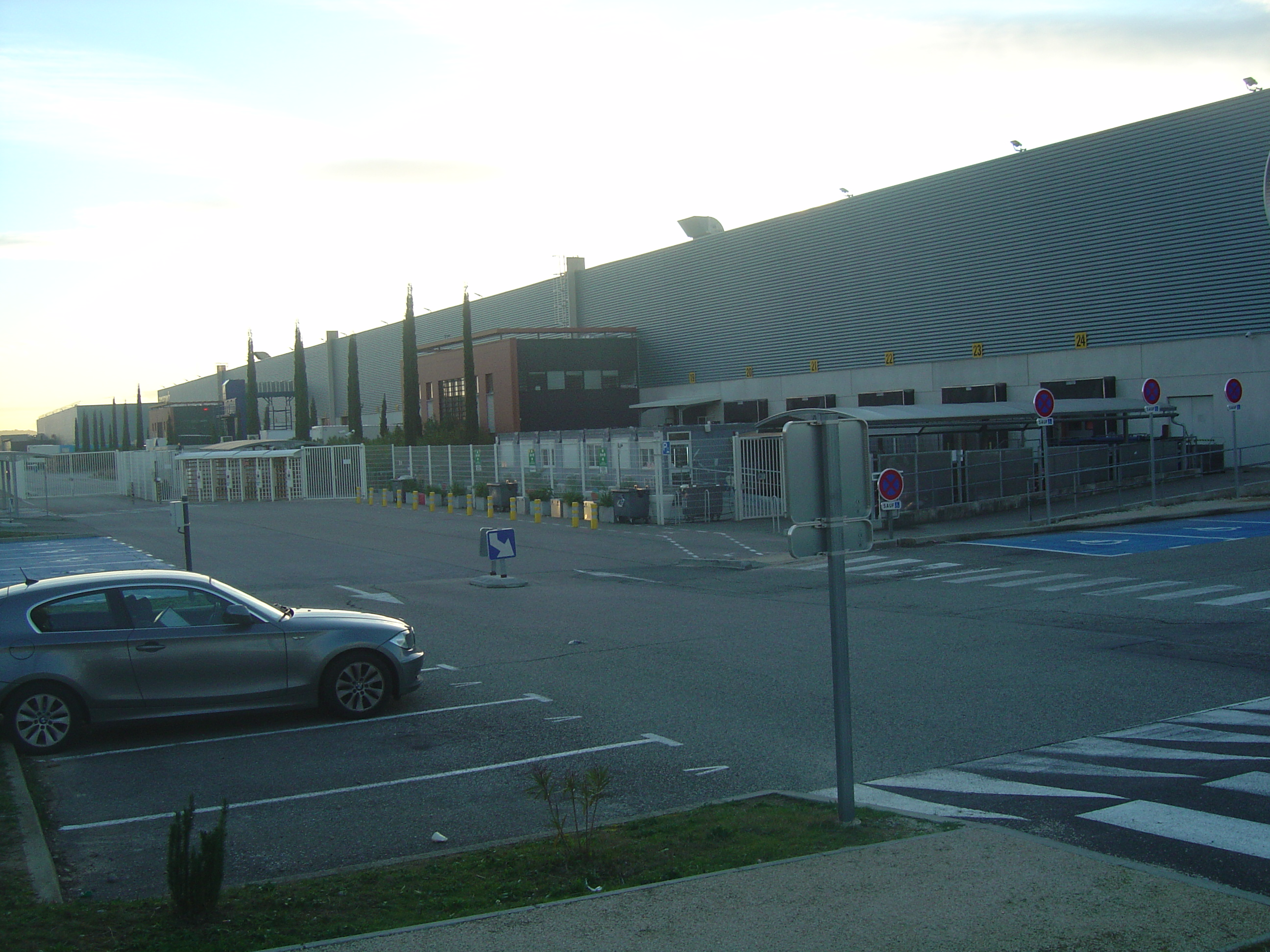 Entrepôt logistique Amazon de Montélimar dans la Drôme (26)